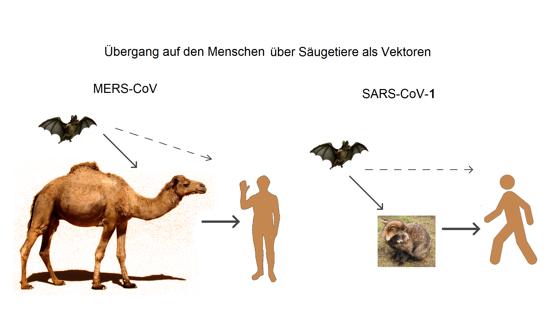 Übertragung von MERS-CoV und SARS-CoV-1 auf den Menschen über Säugetiere als Vektoren